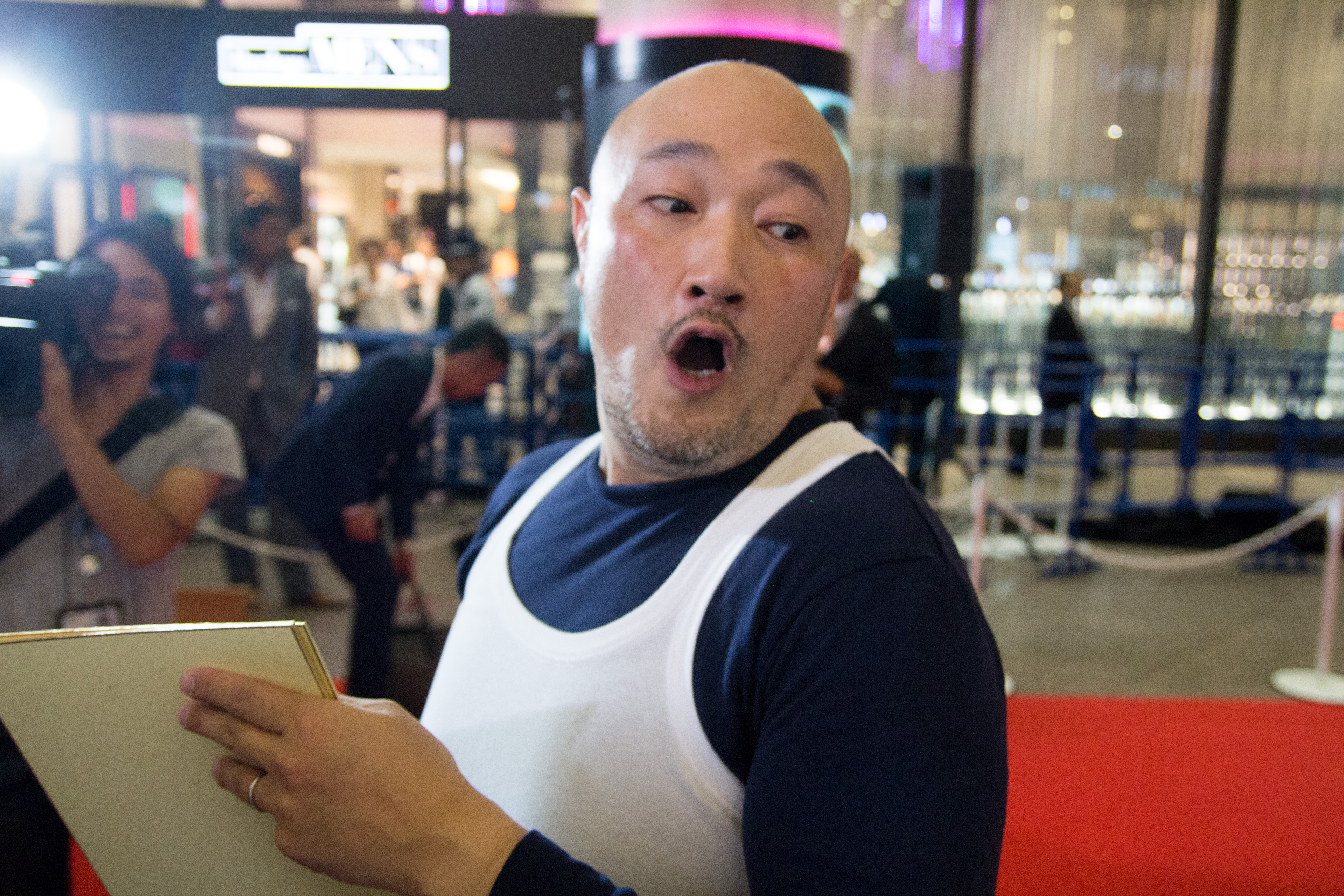 ハドソン川の奇跡 ジャパン・プレミア レッドカーペット くまだまさし